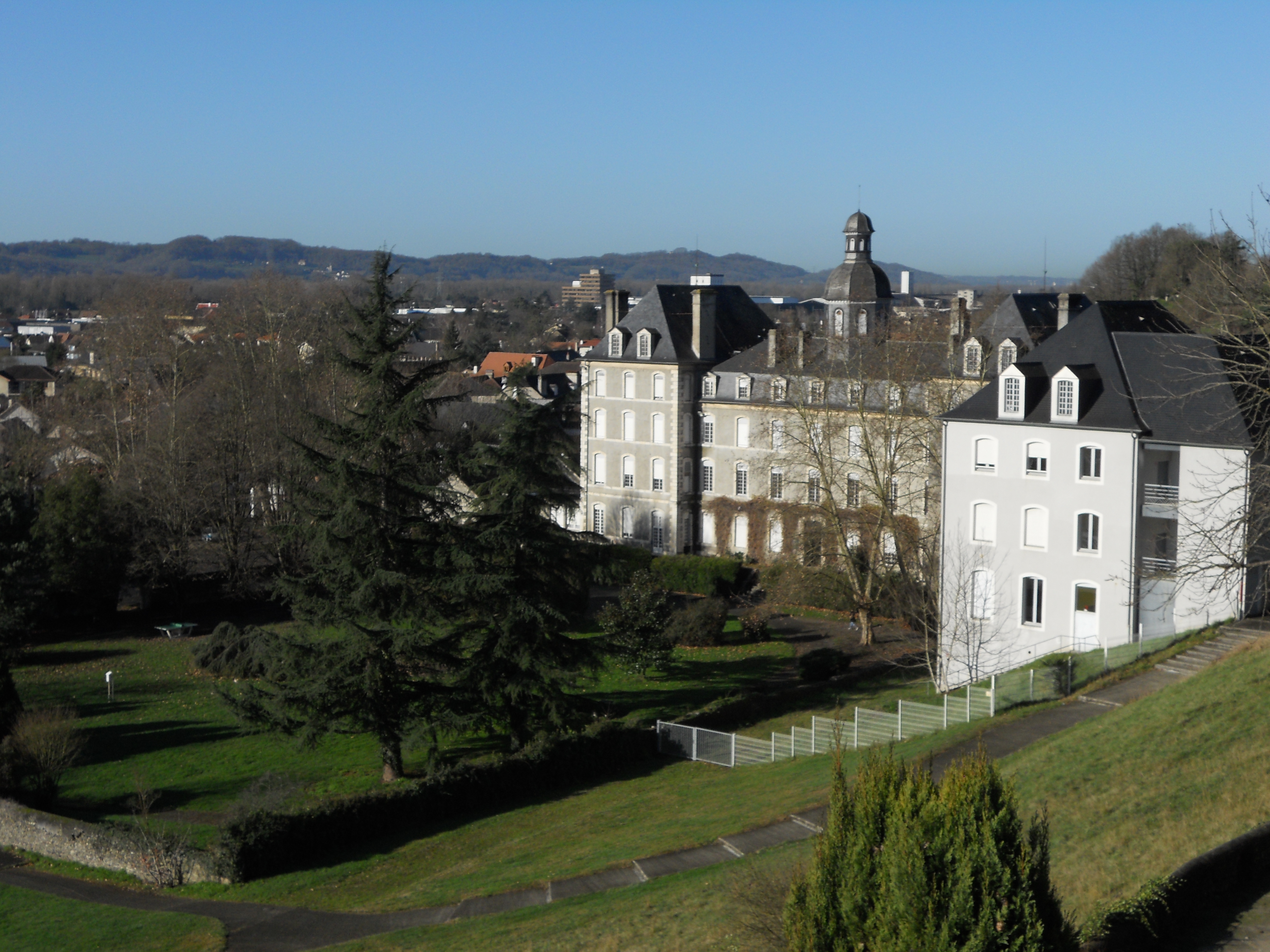 Le Lycée Jacques Monod de Lescar